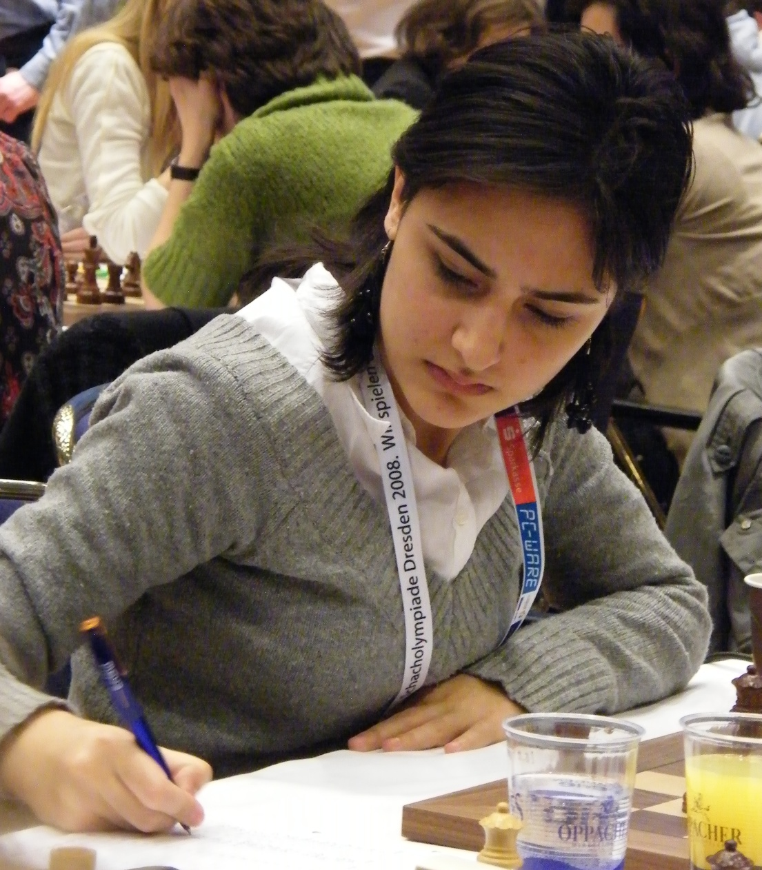 Nargiz Umudowa bei der 38. Schacholympiade in Dresden 2008